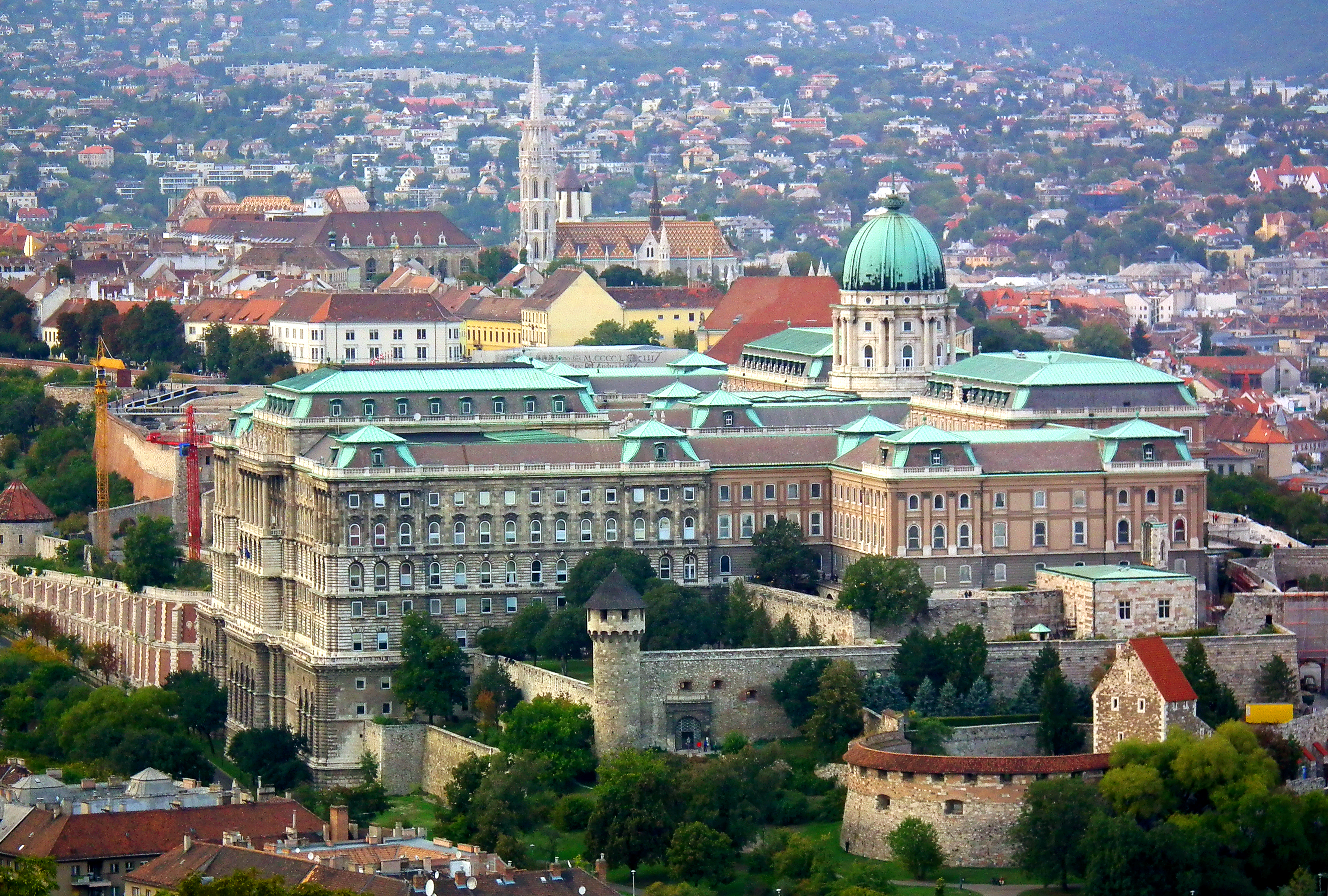 Budavári Palota (A, B, C, D, E, F épület) This is a photo of a monument in Hungary. Identifier: 138